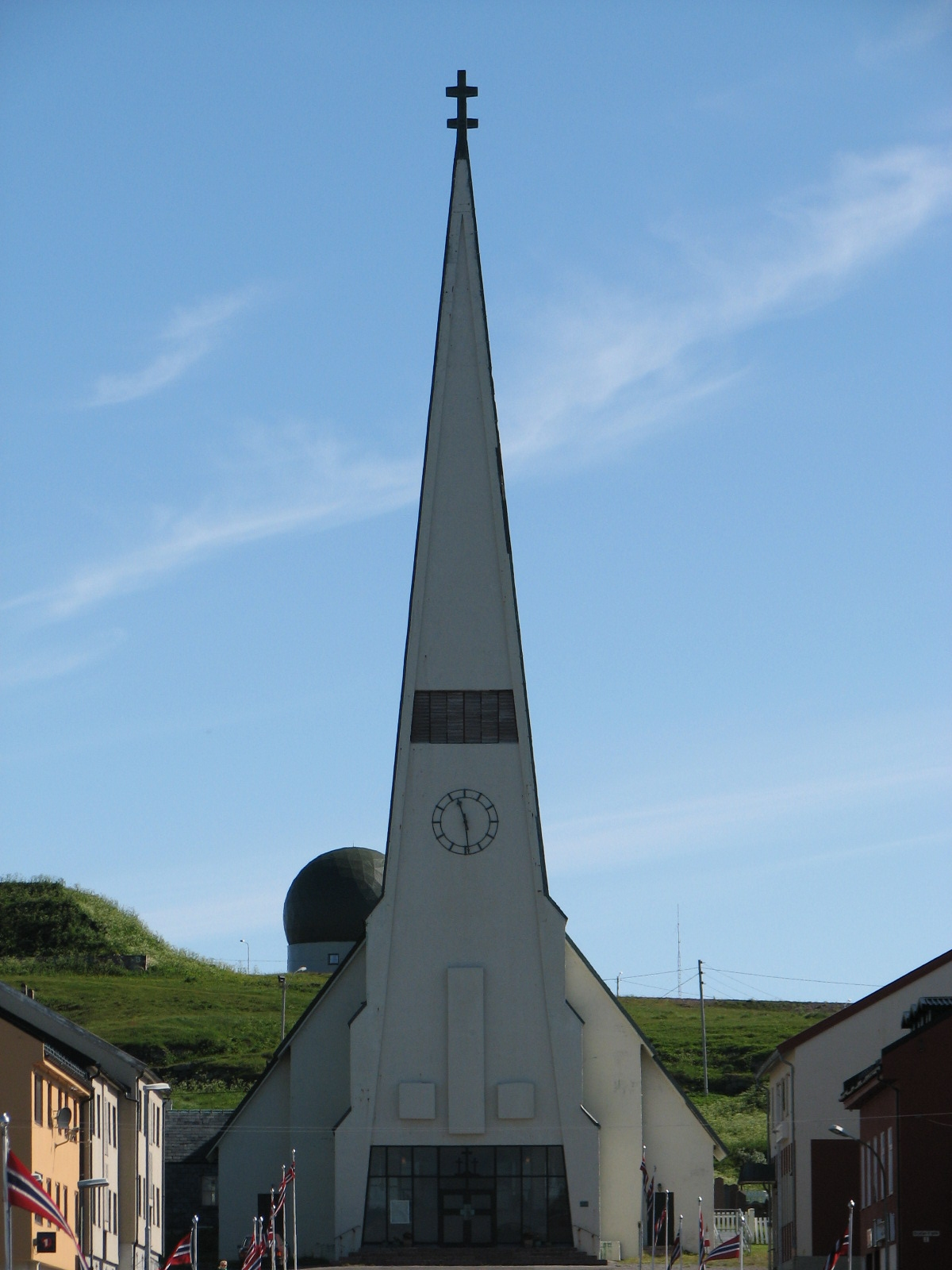 Vardø kirke sommeren 2008.